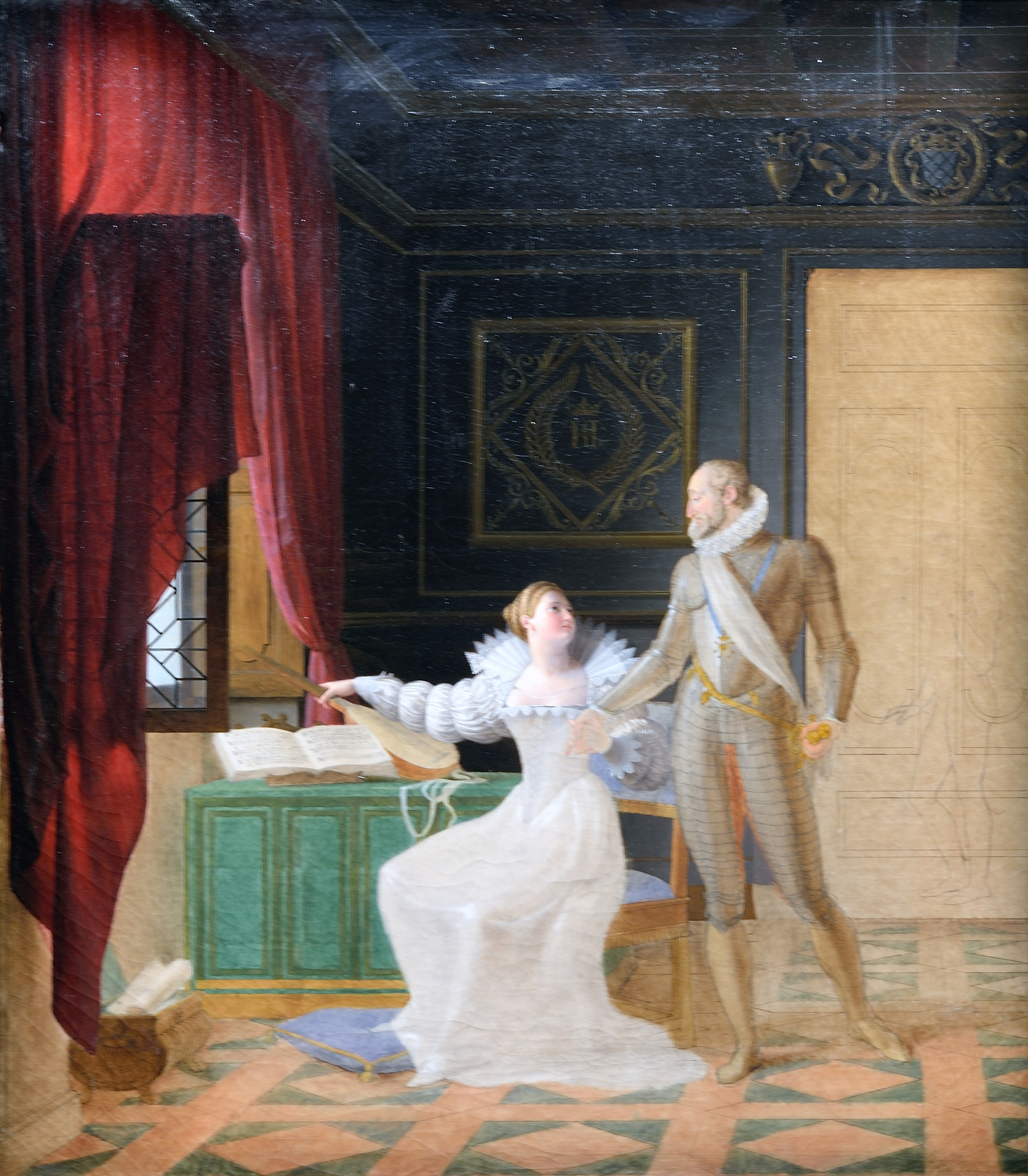 Henri IV chez Gabrielle d’Estrées. Œuvre inachevée, vers 1810-1812 par Fleury François Richard.